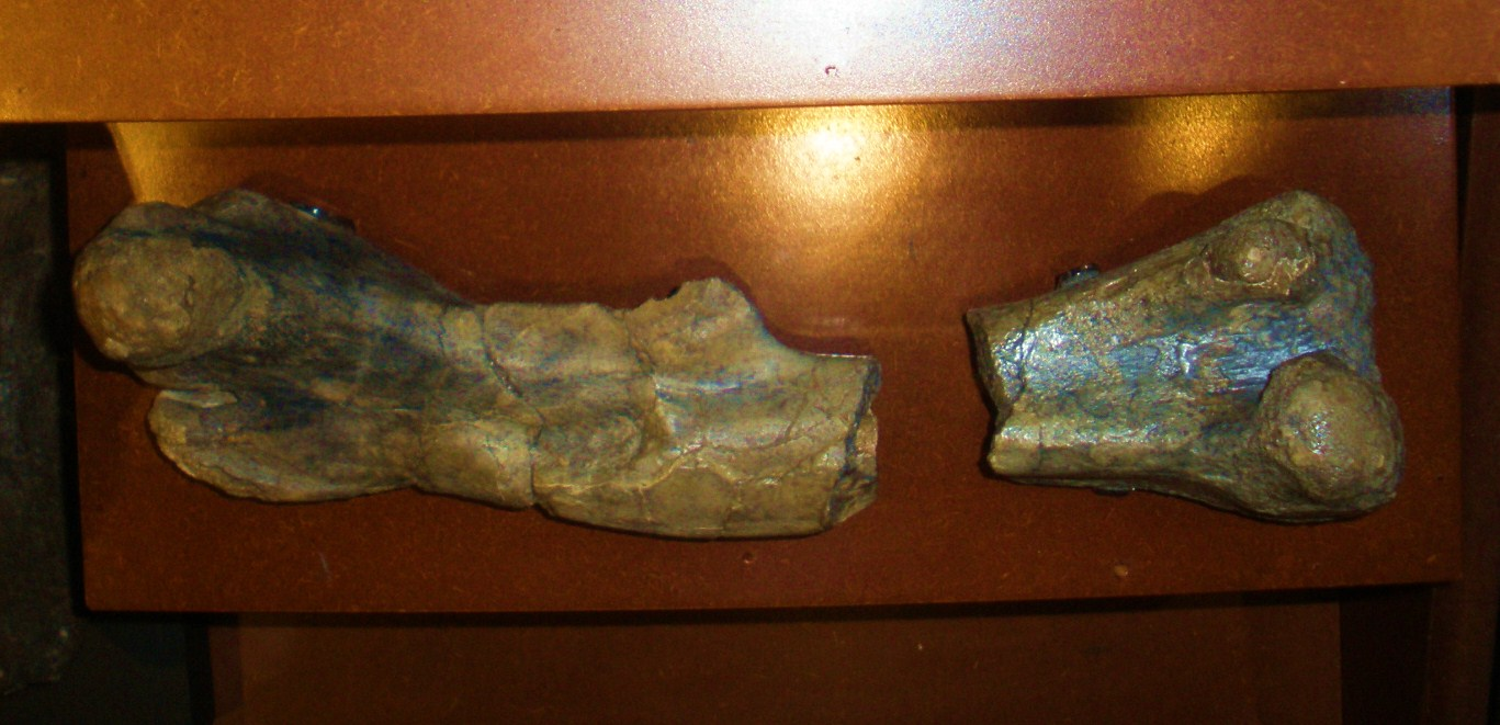 Fossil of Dysalotosaurus, an extinct dinosaur-- Took the photo at Natural History Museum, London